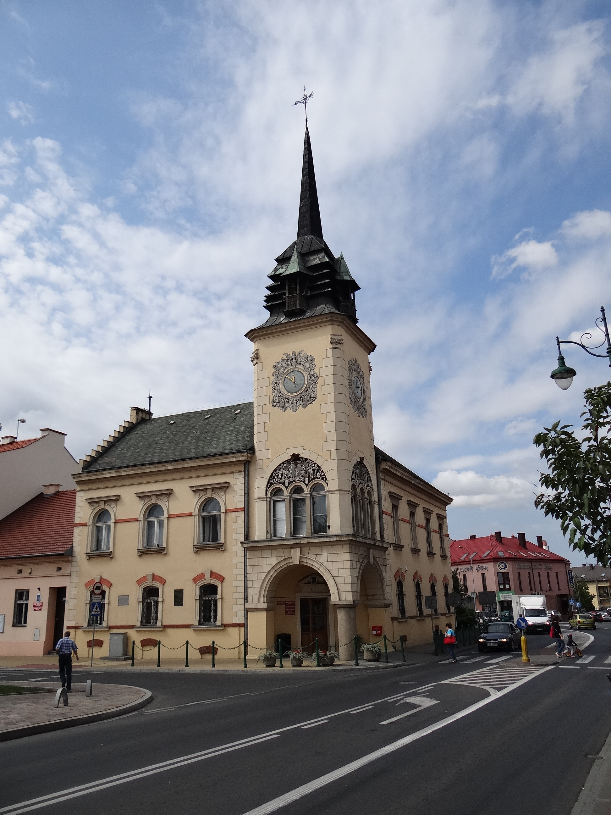 Skawina, budynek Sokoła, XIX/XX